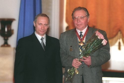 МОСКВА, БОЛЬШОЙ КРЕМЛЕВСКИЙ ДВОРЕЦ. Вручение государственных наград. Орденом «За заслуги перед Отечеством» III степени награжден руководитель центрального конструкторского бюро «Лазурит» Николай Кваша.